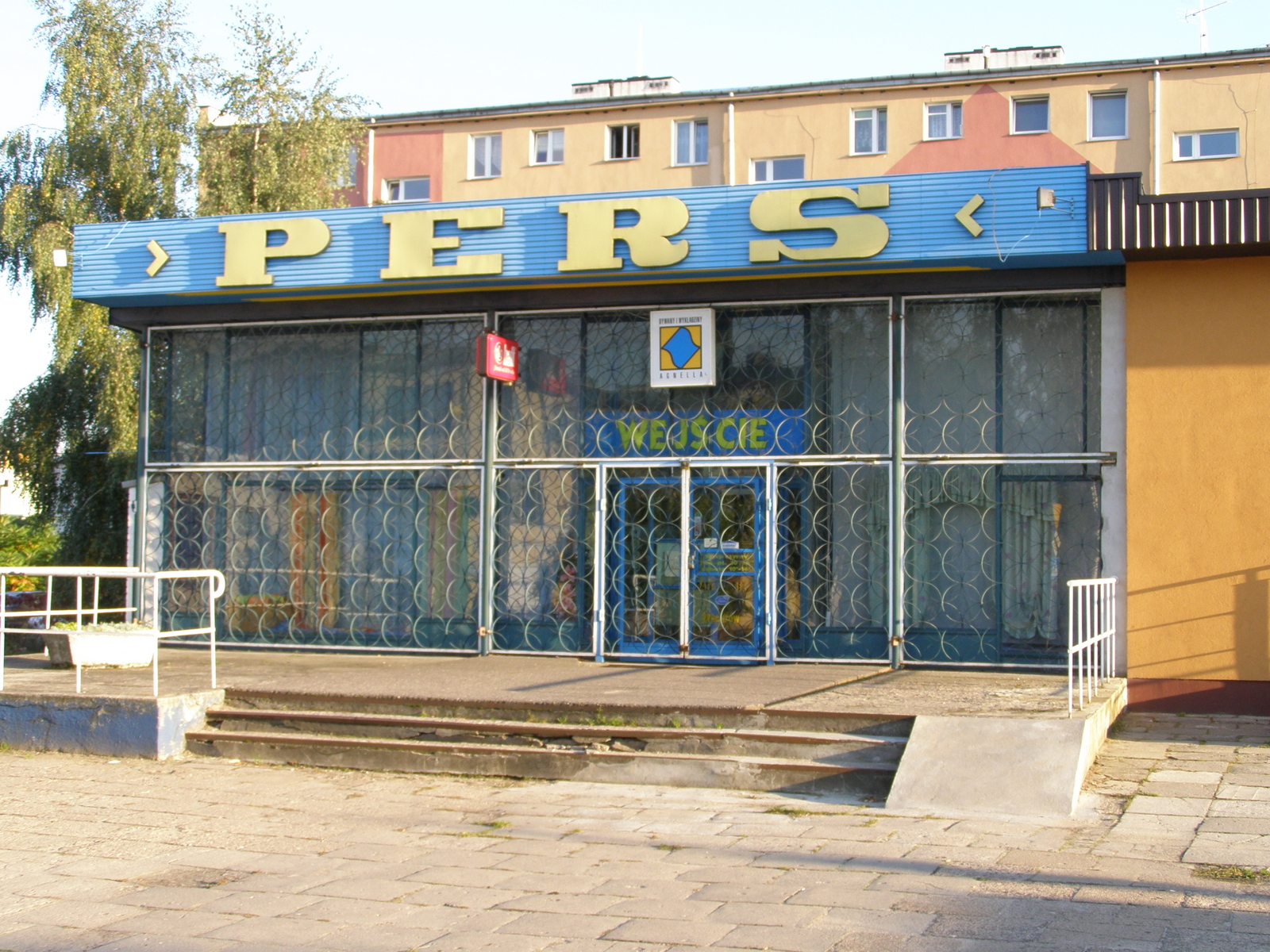 Old (Polish Peoples Republic) Carpets Shop in Mińsk Mazowiecki / PRL'owski sklep z dywanami w Mińsku Mazowieckim